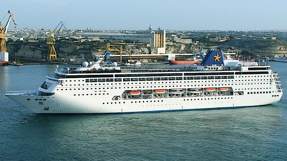 Malta